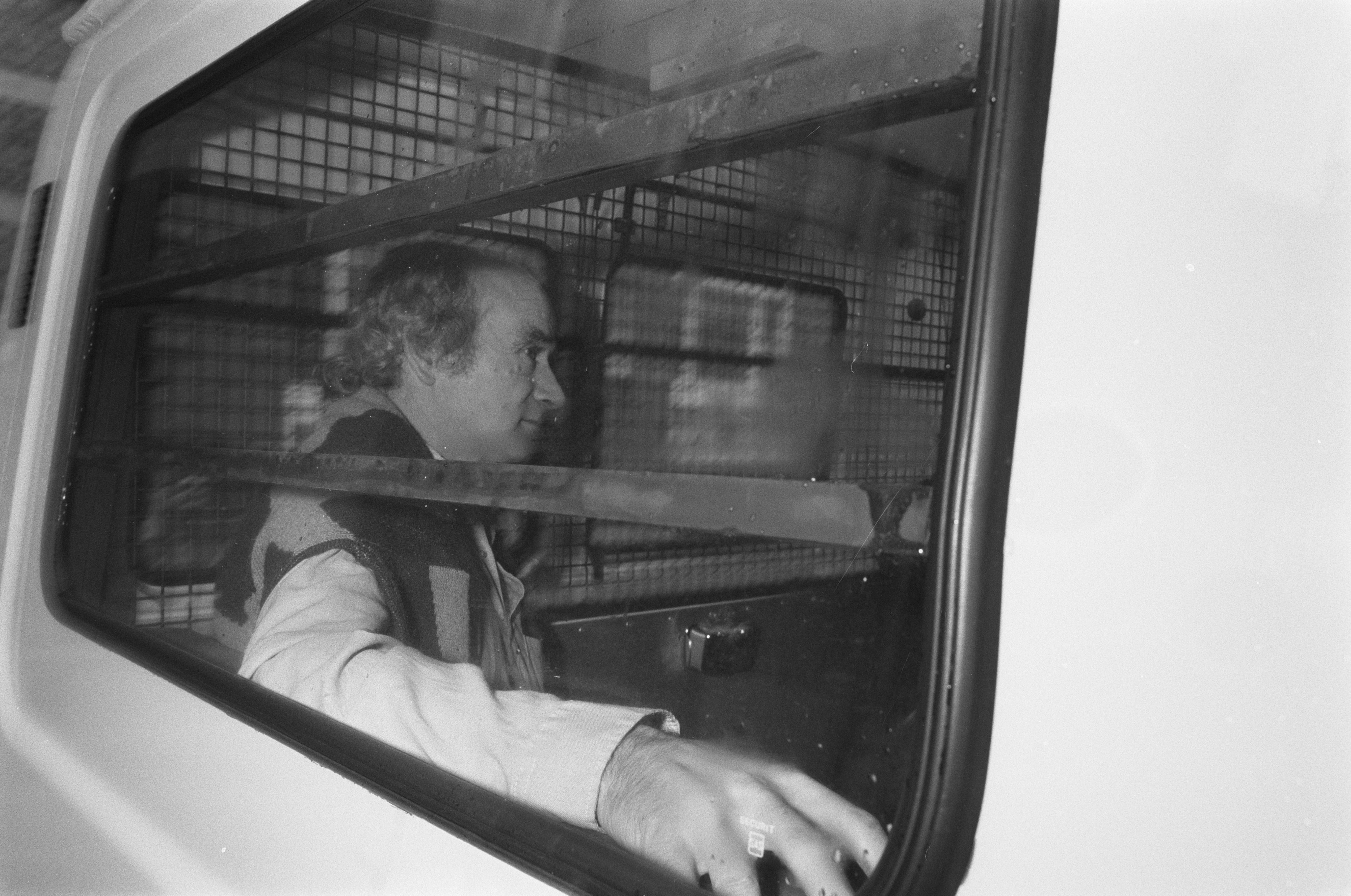 Collectie / Archief : Fotocollectie Anefo Reportage / Serie : [ onbekend ] Beschrijving : Rechtbank te Haarlem doet uitspraak in proces tegen ontvoerder van G.J. Heijn; Ferdi E. (Elsas) in auto bij aankomst Datum : 14 juli 1988 Locatie : Haarlem, Noord-Holland Trefwoorden : ontvoerders, processen, rechtbanken Persoonsnaam : Elsas, Ferdi Fotograaf : Croes, Rob C. / Anefo Auteursrechthebbende : Nationaal Archief Materiaalsoort : Negatief (zwart/wit) Nummer archiefinventaris : bekijk toegang 2.24.01.05 Bestanddeelnummer : 934-2863